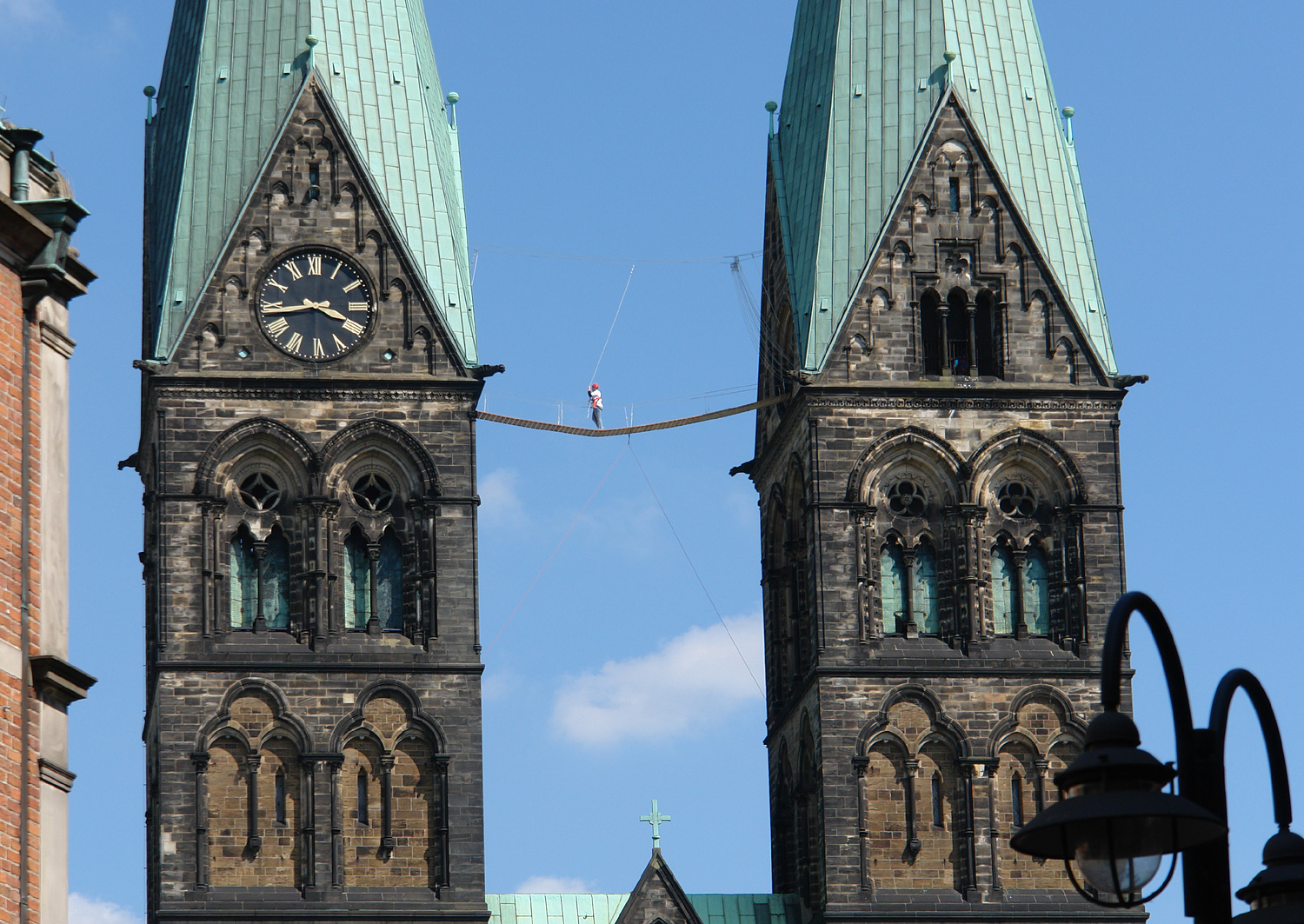 Ev. Kirchentag 2009 in Bremen: Die Himmelsbrücke, eine 13m lange Hängebrücke in 65m Höhe zwischen den Türmen des Bremer Doms